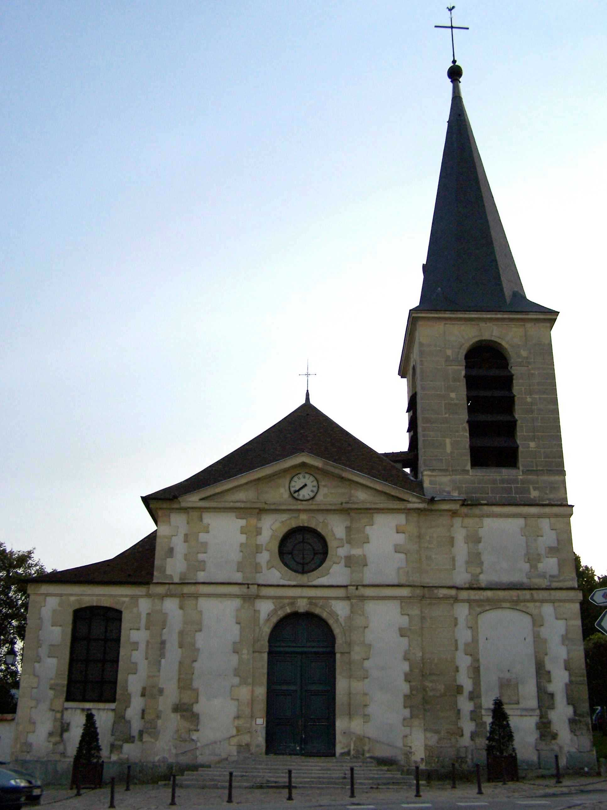 Église Saint-Vigor de Marly-le-Roi(Yvelines, France)